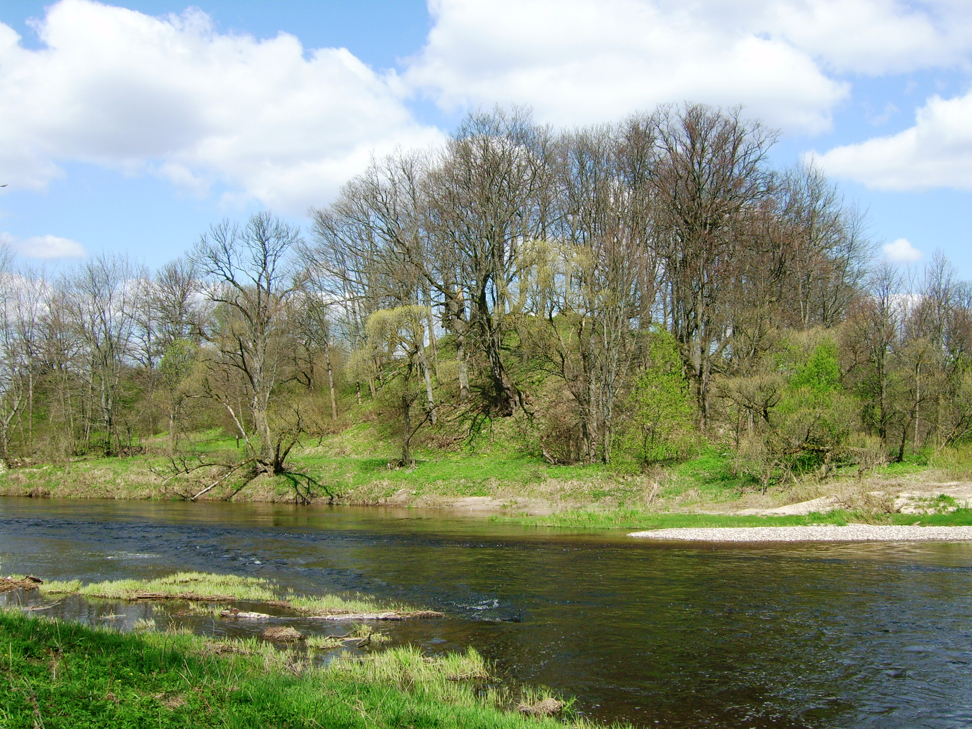 Matiškių piliakalnis ir Jūra